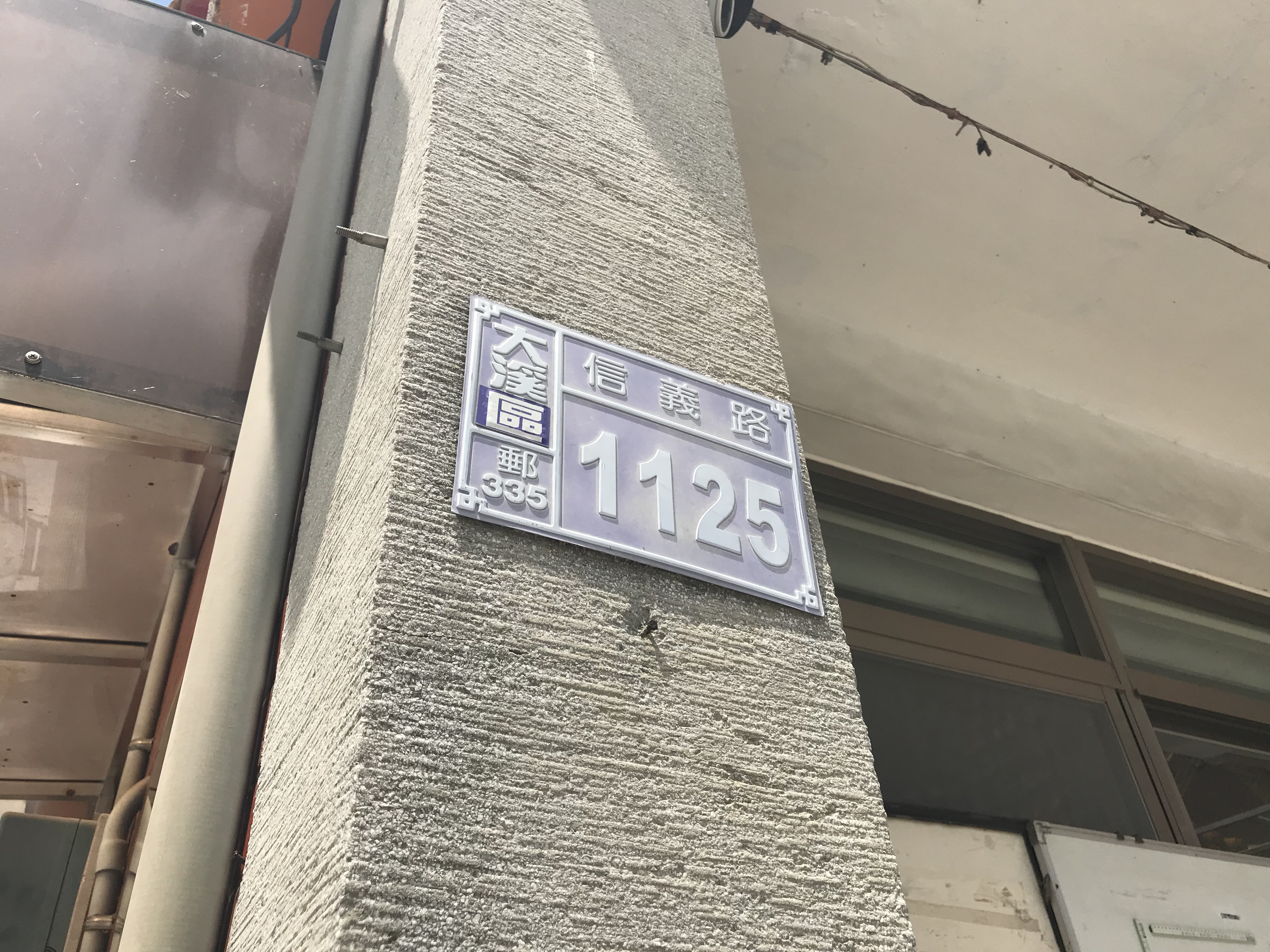 中文（台灣）: 大溪龍山寺門牌